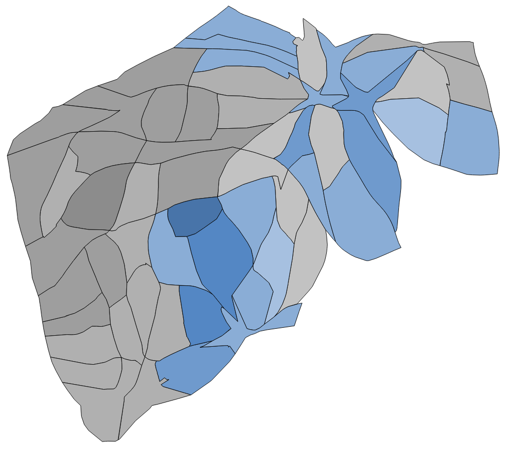 中文（台灣）: 顏色對照表